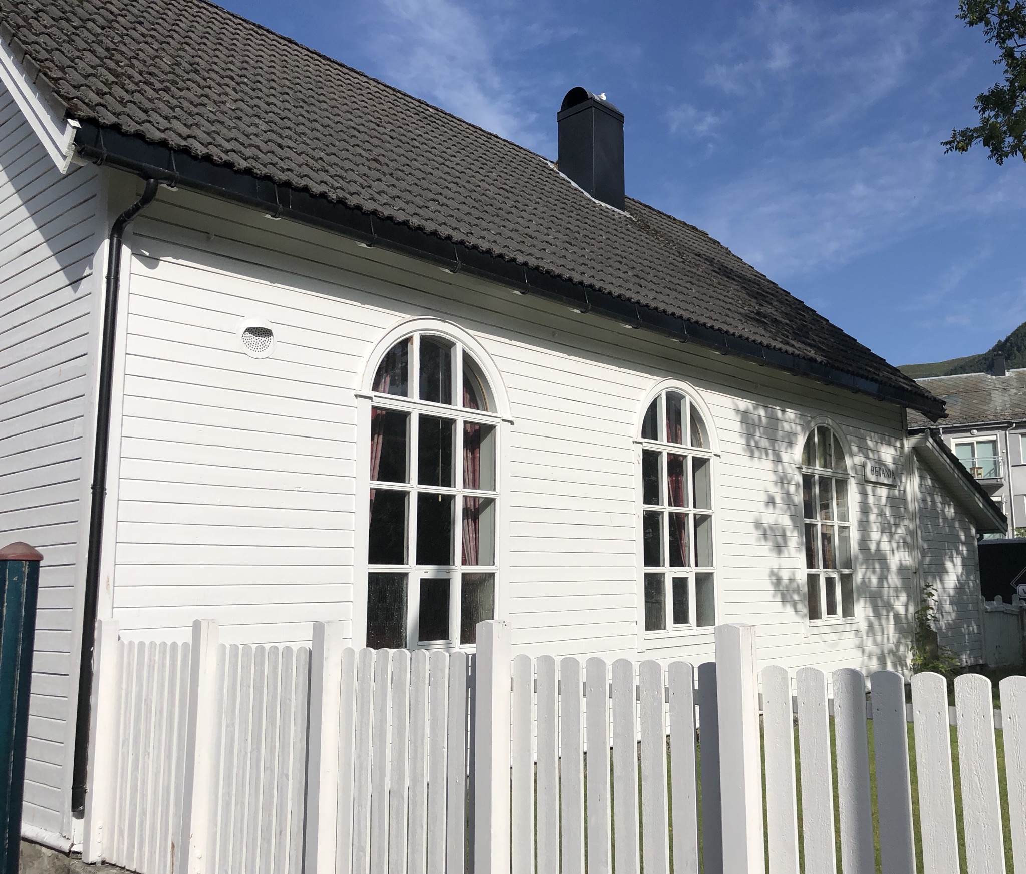 Bethanien in Nordfjordeid